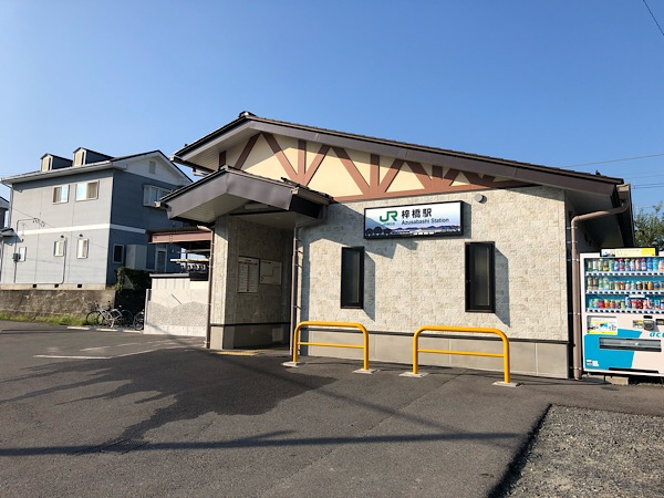 雪の無い梓橋駅の駅舎の画像です。